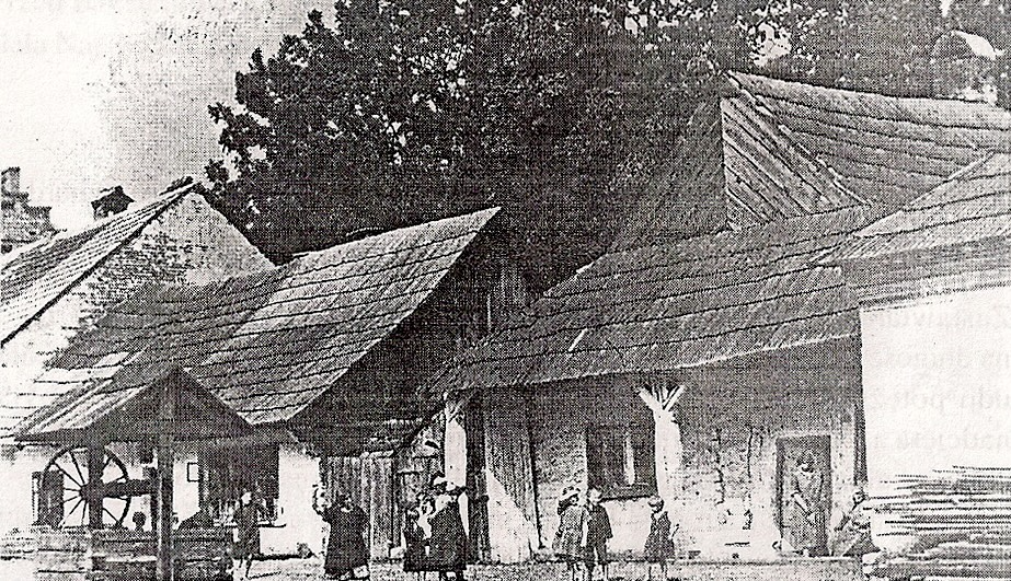 Rudza Zielona (obecnie ul. 3-go maja) w Żywcu, I poł. XX w.